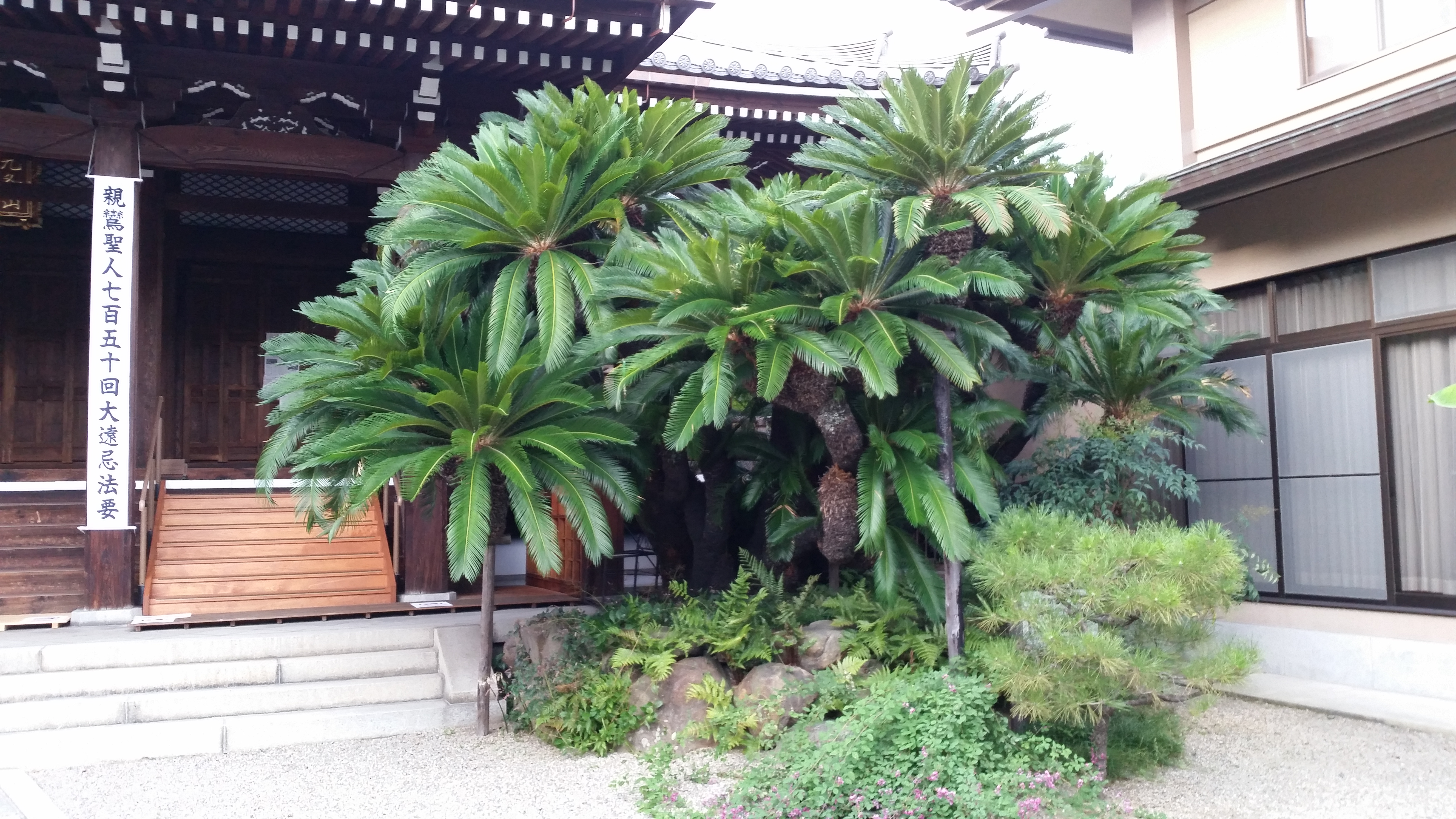 淨教寺ソテツ、奈良